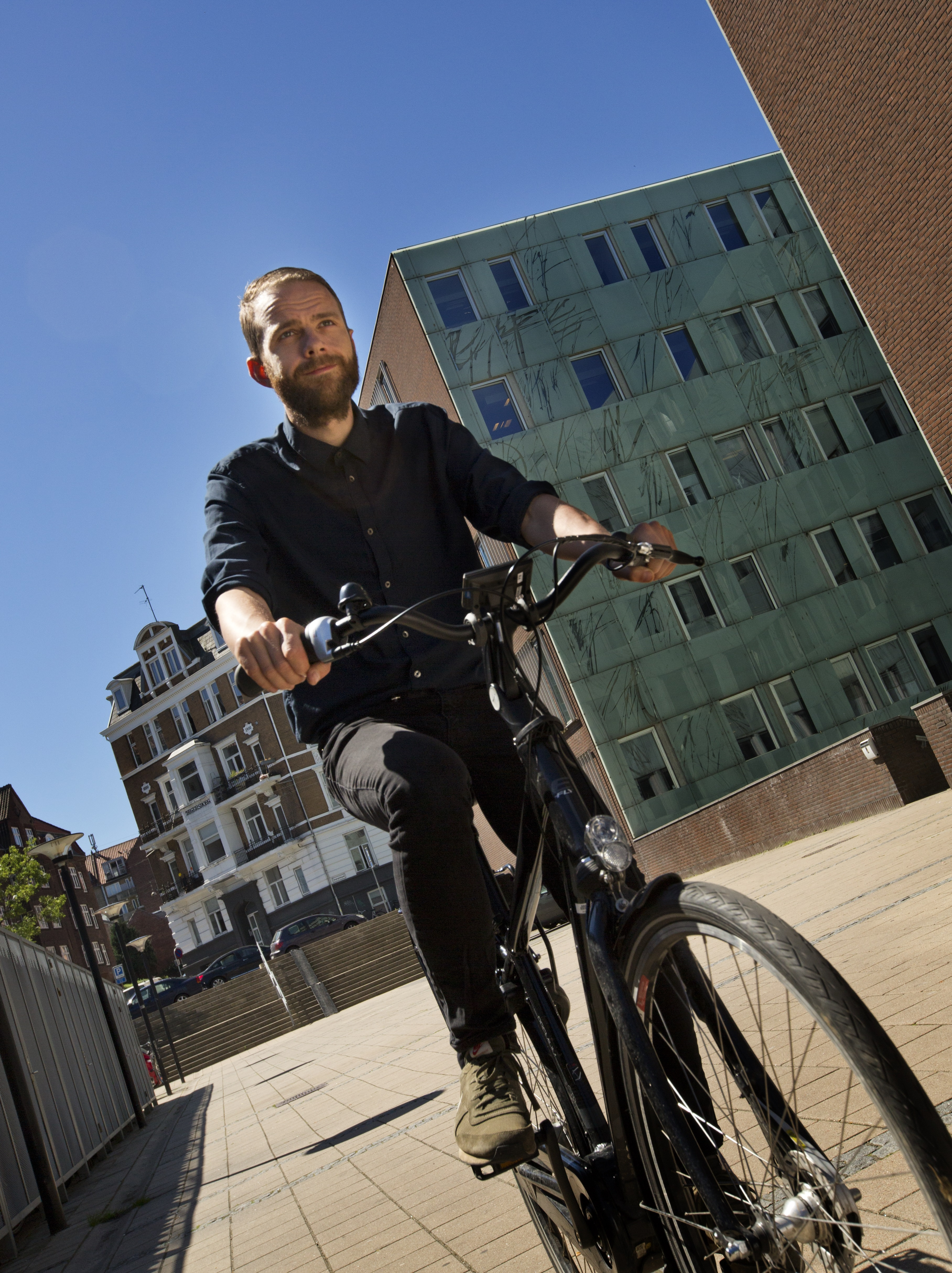 Thomas Medom Hansen, 2015